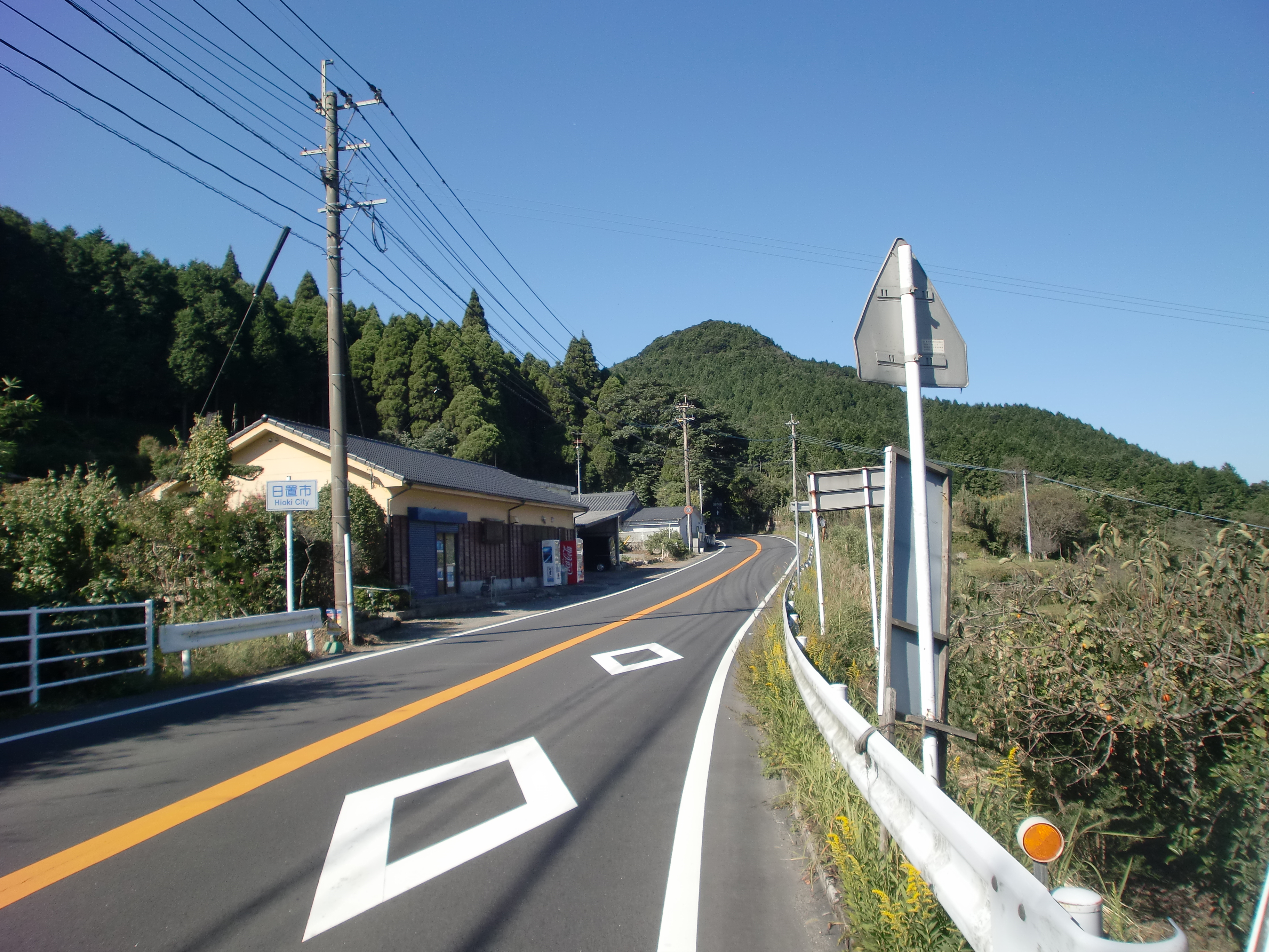 鹿児島県道22号谷山伊作線（鹿児島県道291号松元川辺線の重複区間）を伊作峠（鹿児島市-日置市境）から吹上方面を望む